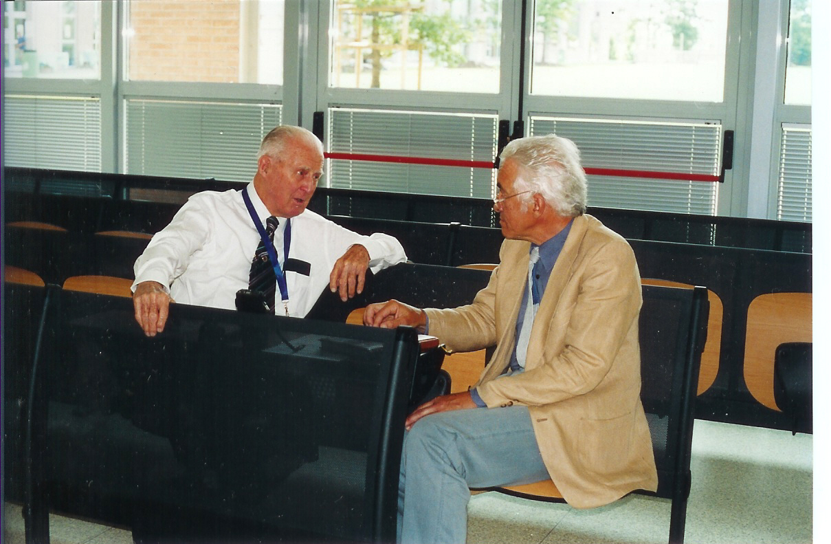 Norman Borlaug intervistato da Antonio Saltini all'università di Bologna il 5 settembre 2004